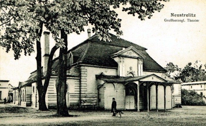 Hoftheater Neustrelitz, 1924 durch Feuer zerstört